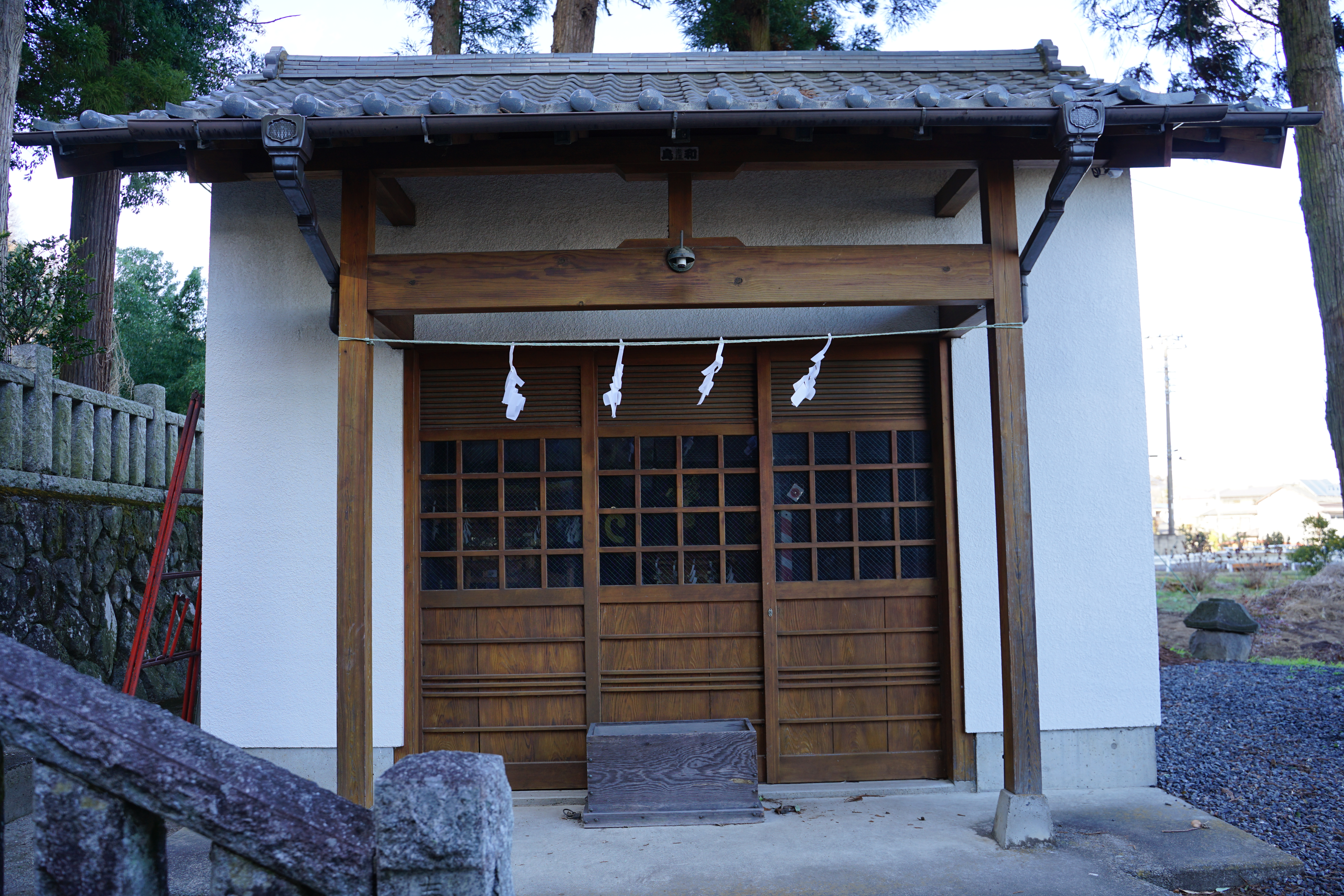 甲波宿禰神社 (渋川市行幸田)の神輿殿